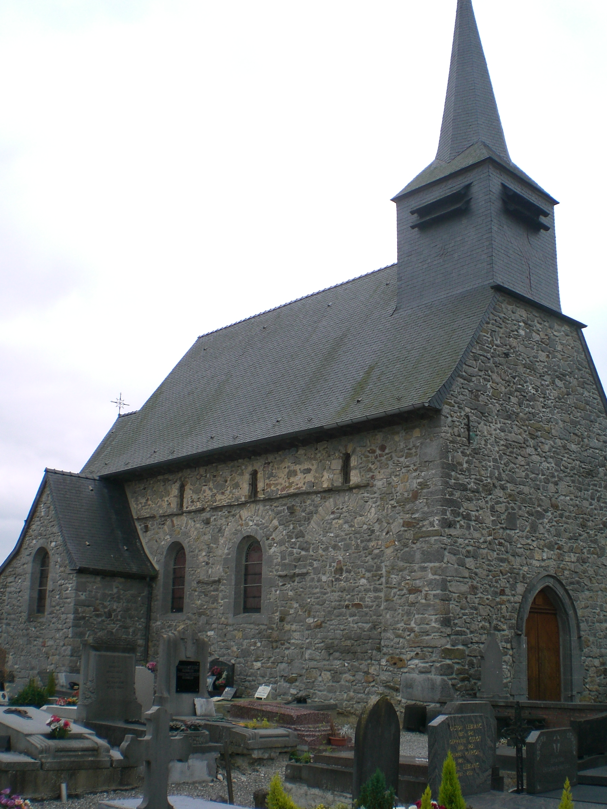 eglise de Damousies nord france